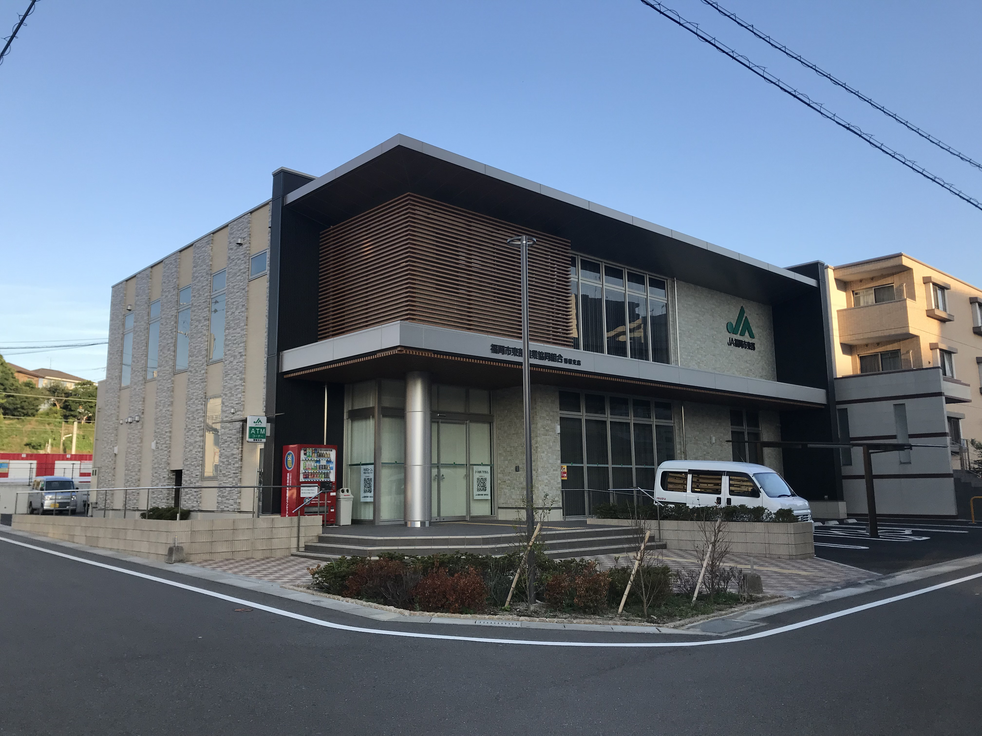 福岡市東部農業協同組合香椎支店